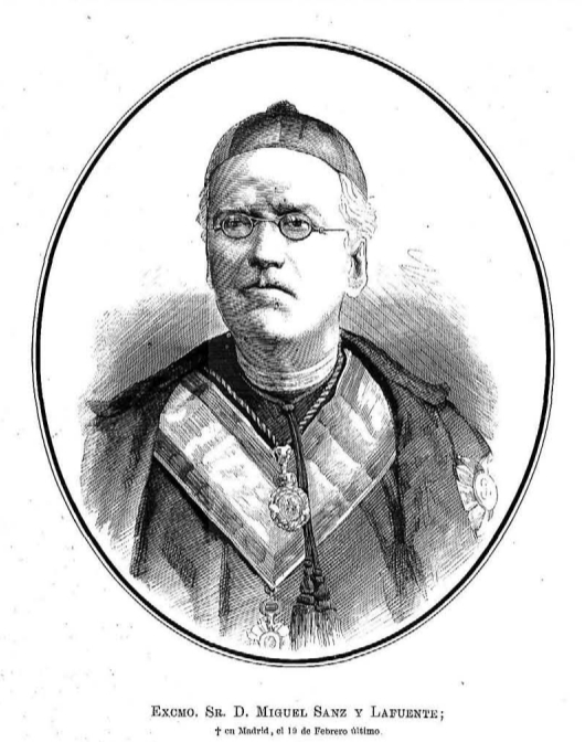 Retrato de Miguel Sanz y Lafuente, en La Ilustración Española y Americana.